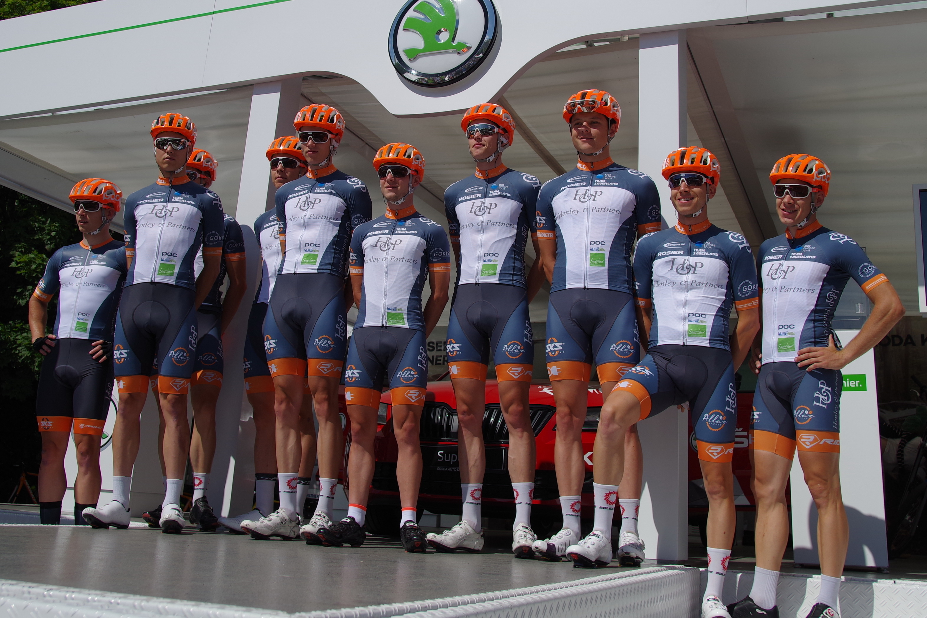 Deutsche Meisterschaften im Straßenrennen 2017 (Männer) 25. Juni 2017 Einschreibkontrolle The making of this document was supported by the Community-Budget of Wikimedia Germany.